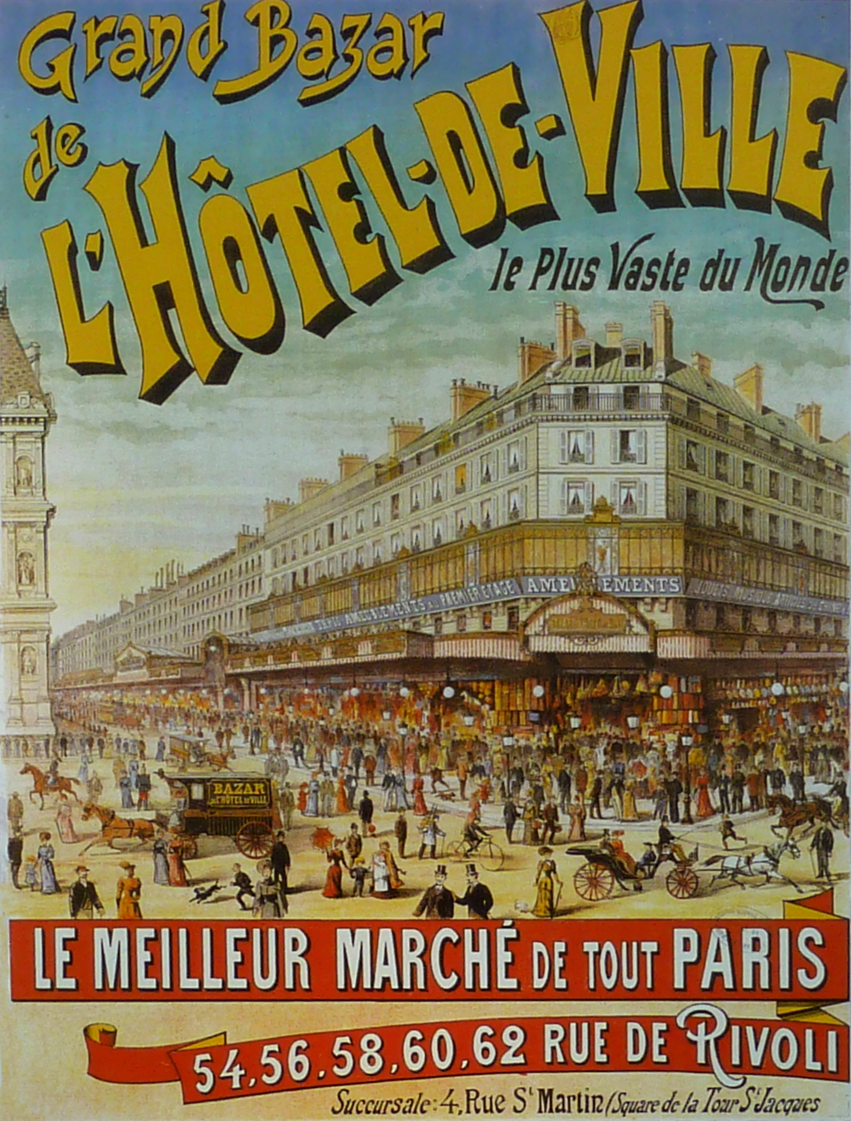 Affiche Bazar de l'Hôtel de Ville 1891 par Émile Lévy (1826-1890). Photo d'une reproduction affichée en face du magasin lors d'une exposition.